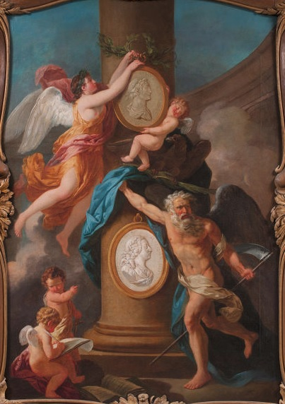 Peinture glorifiant François III, dernier duc de Lorraine devenu Empereur, en montrant l'ancienneté de sa famille, remontant à Gérard d'Alsace, premier duc héréditaire de Lorraine. Conservé au Musée Lorrain, Inv. D.III.848.